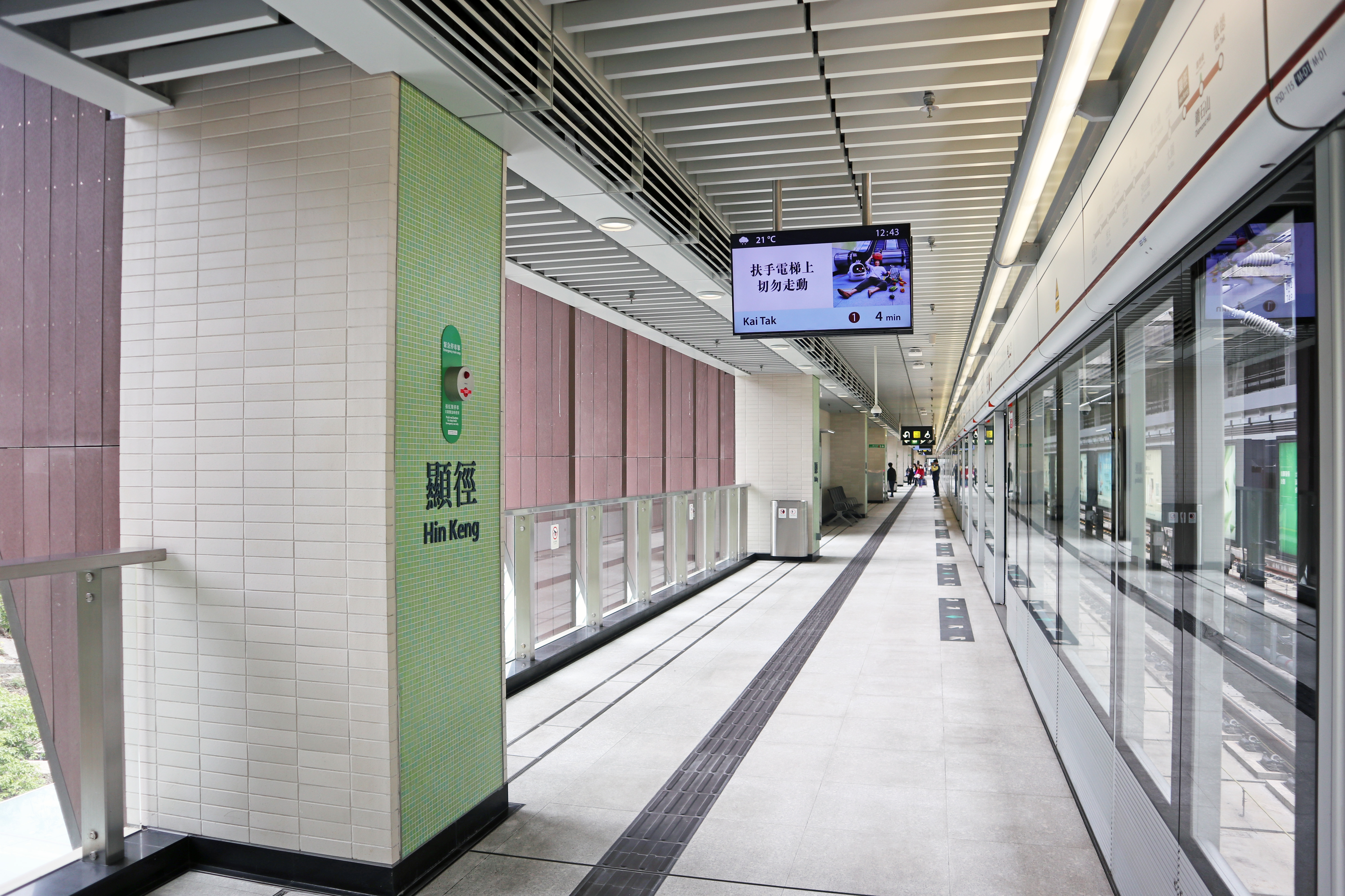 港鐵顯徑站月台